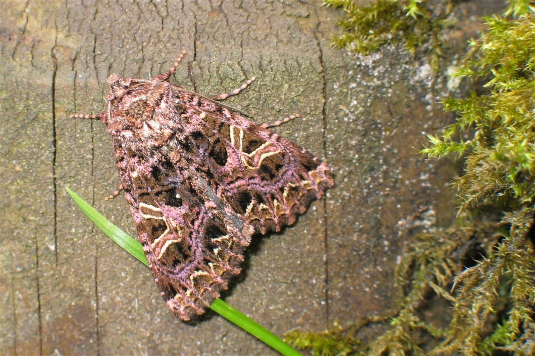 Bacheule (Sideridis rivularis)